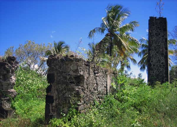 La cheminée